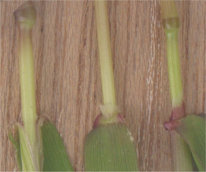 (Vroege haver tongetje) Aira preacox ligula